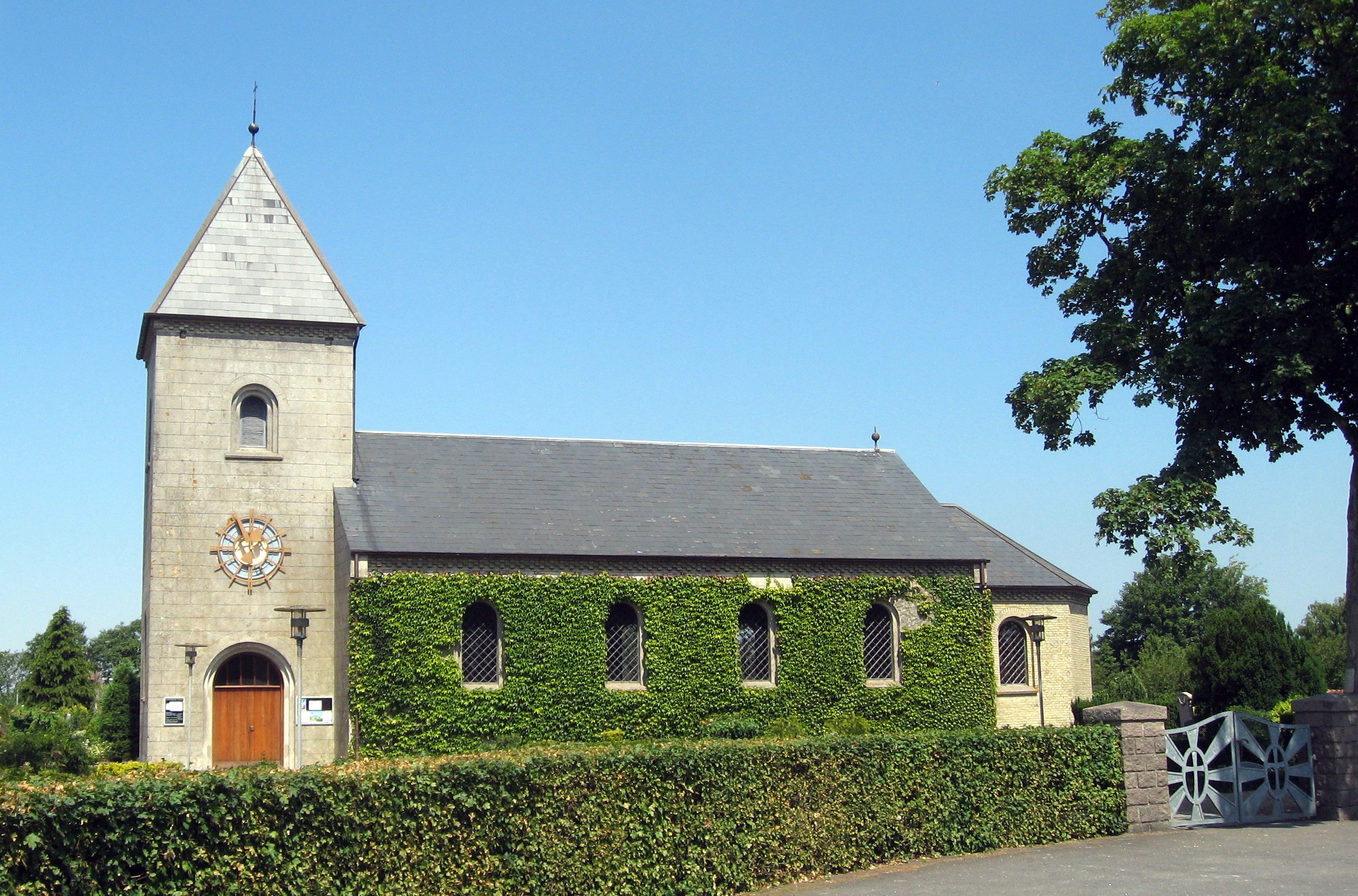 Langeslund Kirke (Jammerbugt Provsti (Aalborg Stift))